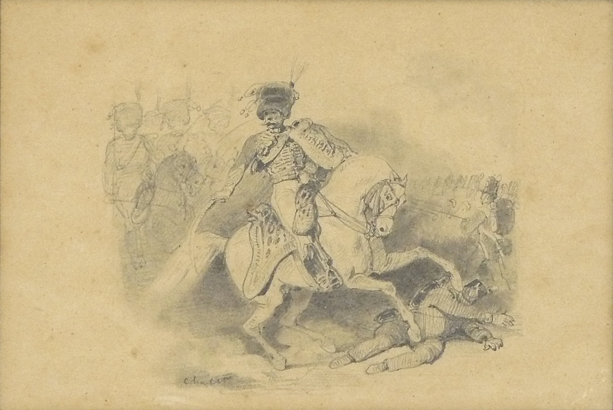 Charlet N.T. - Pencil - Le général Lallemand à Waterloo - ~10.3x15cm. Ce dessin a servi pour illustrer le mémorial de St Hélène du Comte Emmanuel de Las Cases. La gravure sur bois qui figure dans cet ouvrage de référence (p657, tome 2 édition de 1842, « Napoléon dans l’exil ») a été réalisée par un artiste médiocre. Le Colonel de La Combe écrit dans la biographie de l’artiste : « Et si l'on trouvait qu'en cette occasion Charlet est au dessous de lui-même, que l'on compare ses dessins à ceux qui ont illustré d'autres livres du même genre, et on reconnaîtra sa supériorité. Il faut savoir aussi qu'à l'époque où Charlet fit cette illustration, les artistes n'étaient pas aussi bien avisés qu'ils l'ont été depuis, c'est à dire ne traçaient pas eux-mêmes leurs dessins sur le bois, les graveurs pouvant suivre le trait original du maître, comme cela se pratique aujourd'hui. Alors ce dessin original était copié sur bois par un autre artiste, et remis au graveur. On peut dire qu'il était deux fois défiguré, en quelque sorte. Un jour que Charlet était plus mécontent que de coutume : Voyez, me disait-il dans son langage pittoresque, c'est la mort chargée de traduire la vie. » Le texte accompagnant cette vignette dans l’ouvrage de Las Cases est censé être de la bouche de Napoléon, à savoir : « Lallemand a beaucoup de résolution il a le feu sacré. Il commandait les chasseurs de la garde à Waterloo : il enfonça quelques uns de vos bataillons. ». .